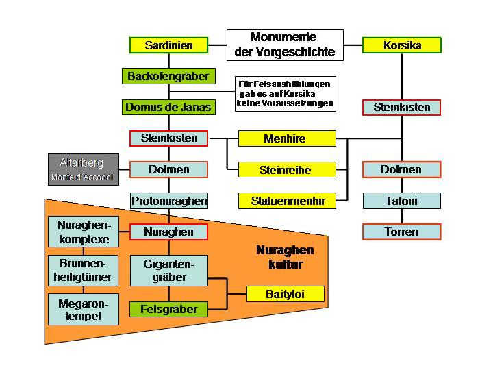 Typen